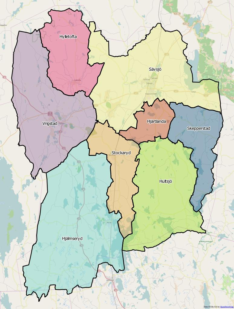 Distriktsindelningen i Sävsjö kommun World file: 73.73338581463058006 0 0 -73.73338581463058006 1596293.76435130764730275 7863047.89924964774399996